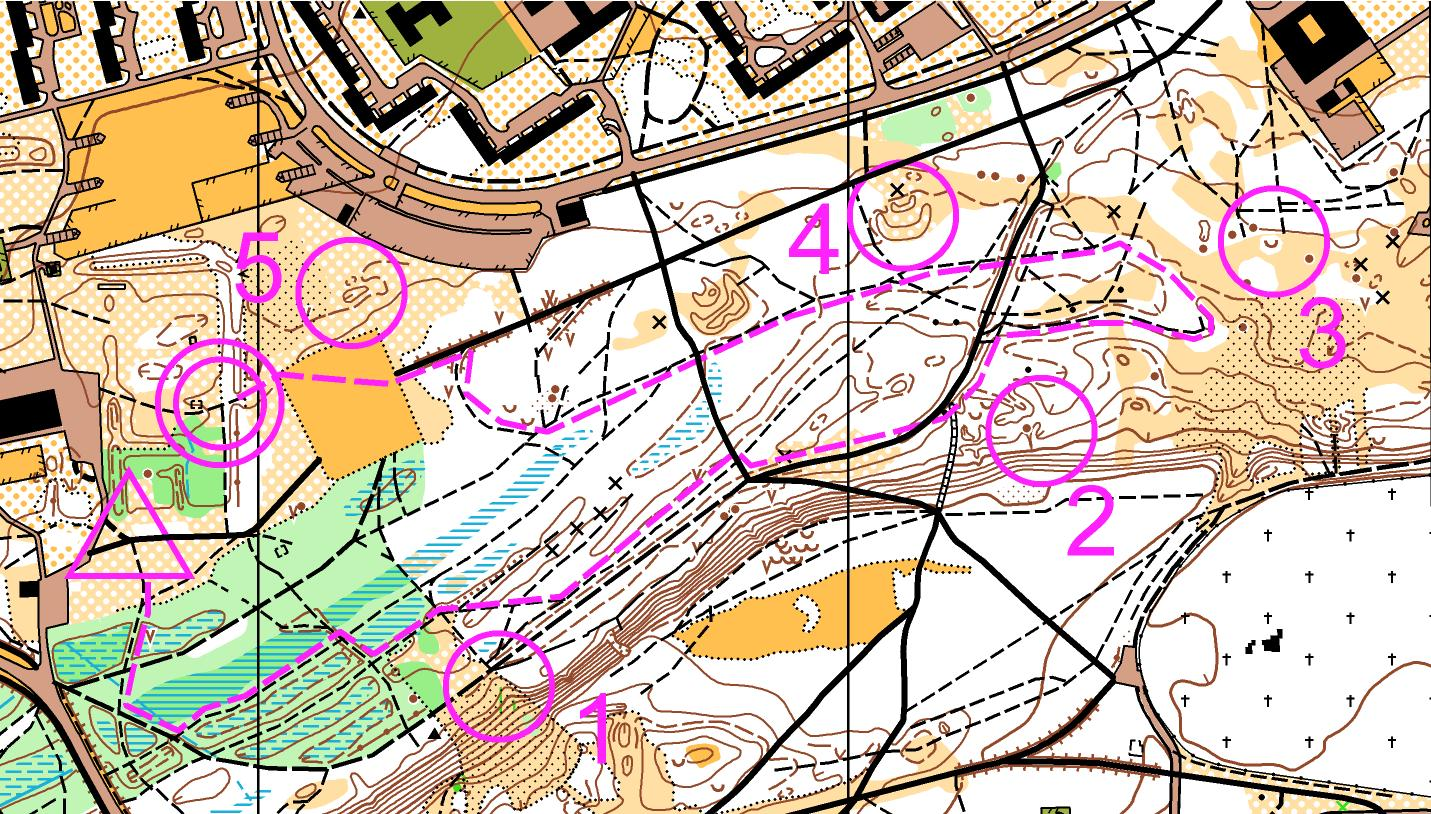 Orienteerumise tugirada